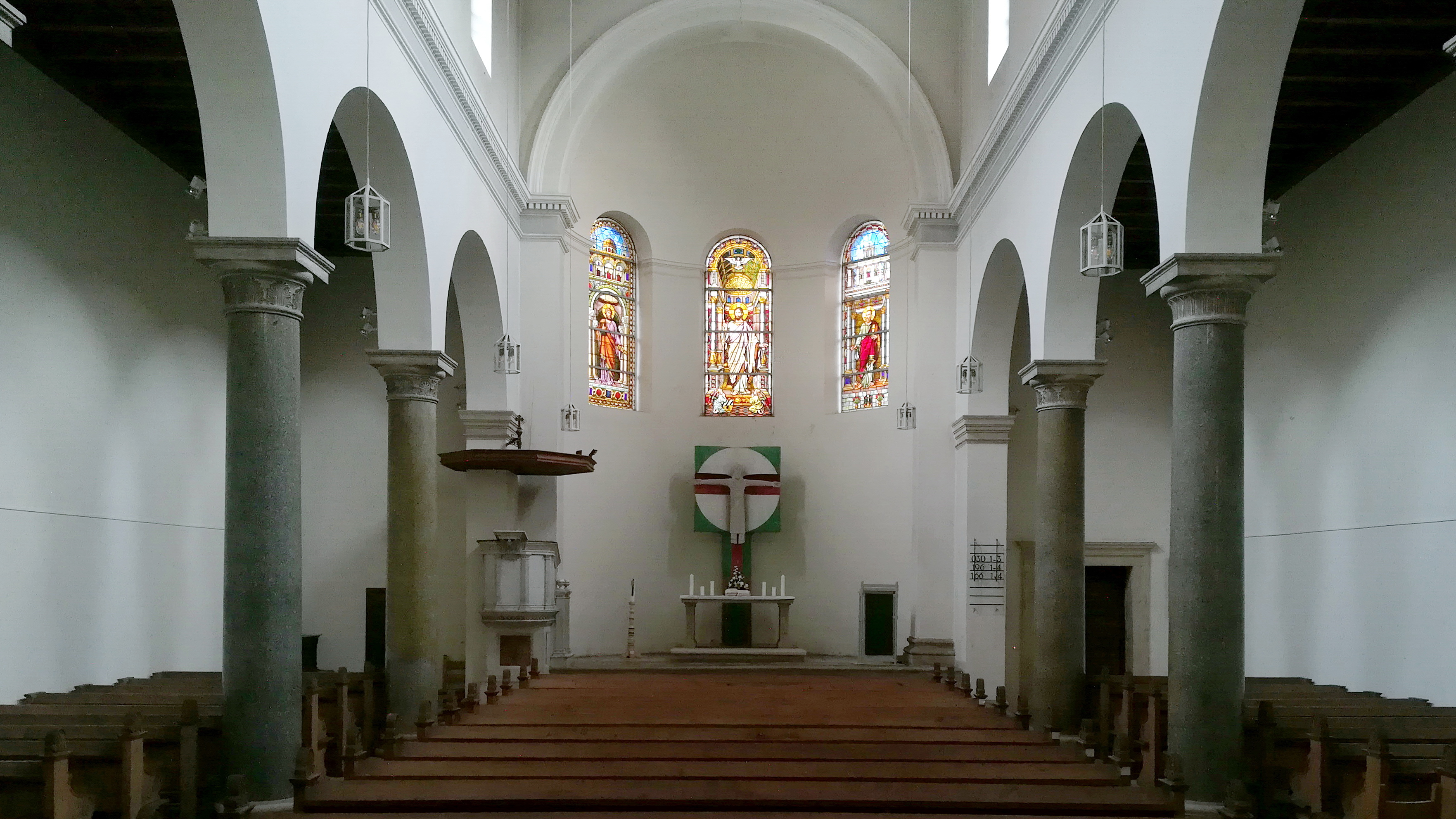 Die Erlöserkirche in Eichstätt ist eine evangelisch-lutherische Kirche.